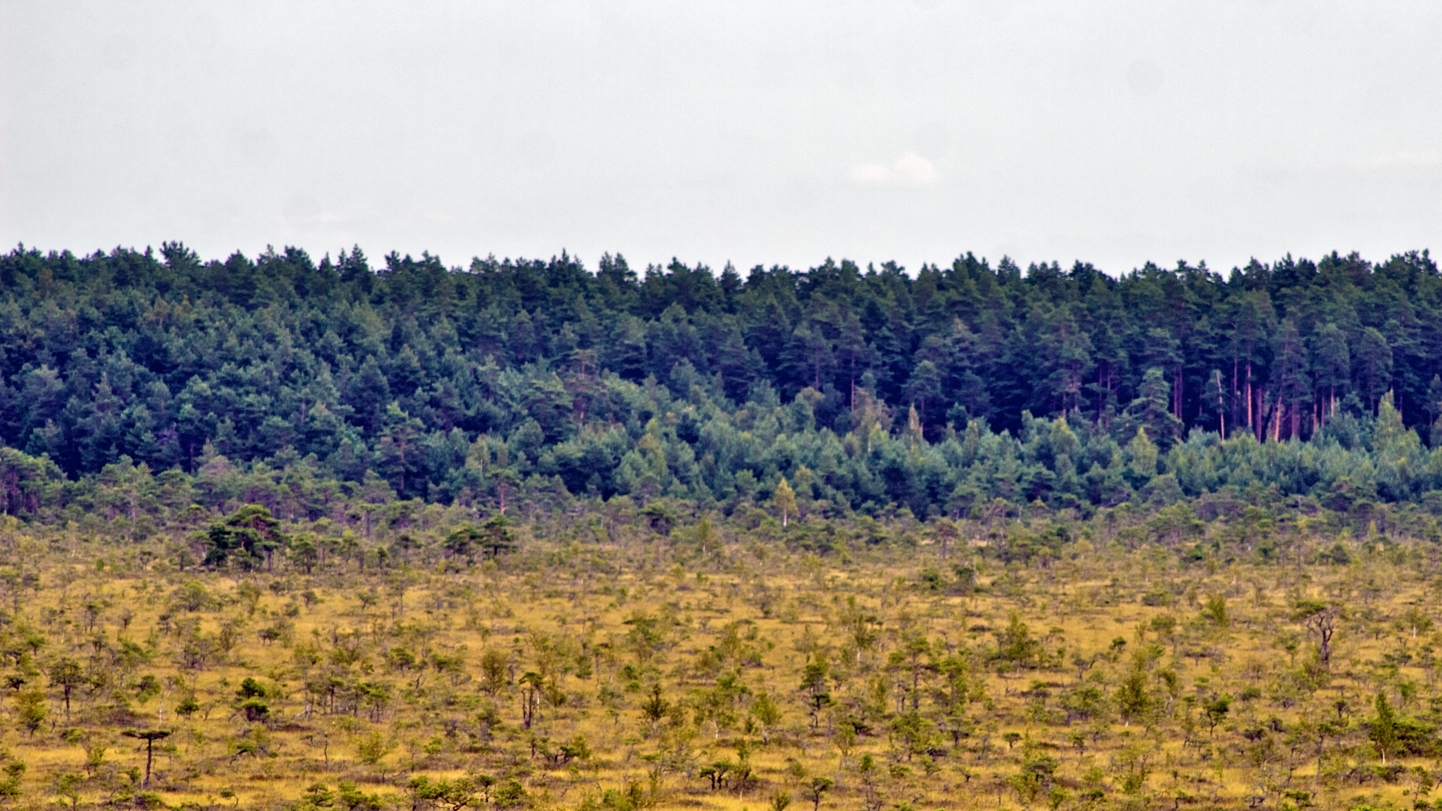 Lindi bog in Estonia.